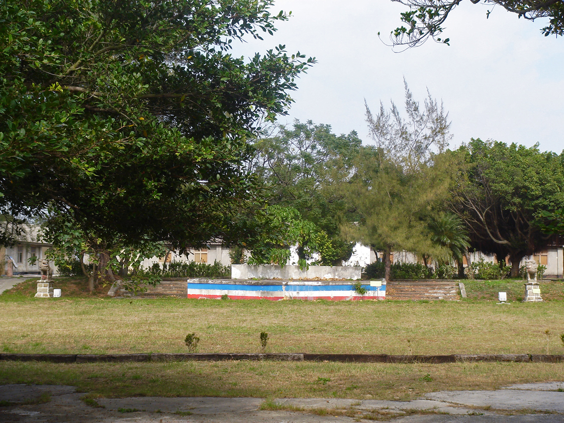 台中清水牛罵頭遺址。